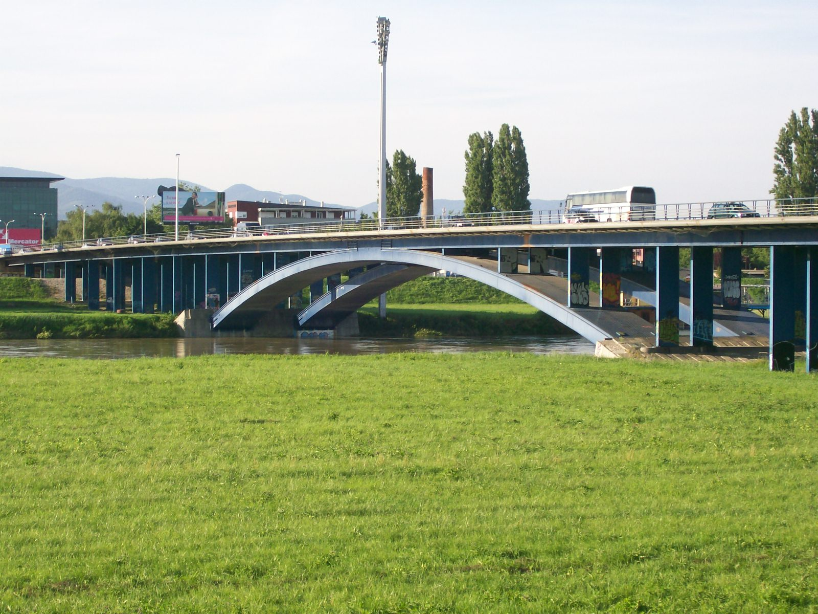 Most preko Save u Zagrebu - Most slobode